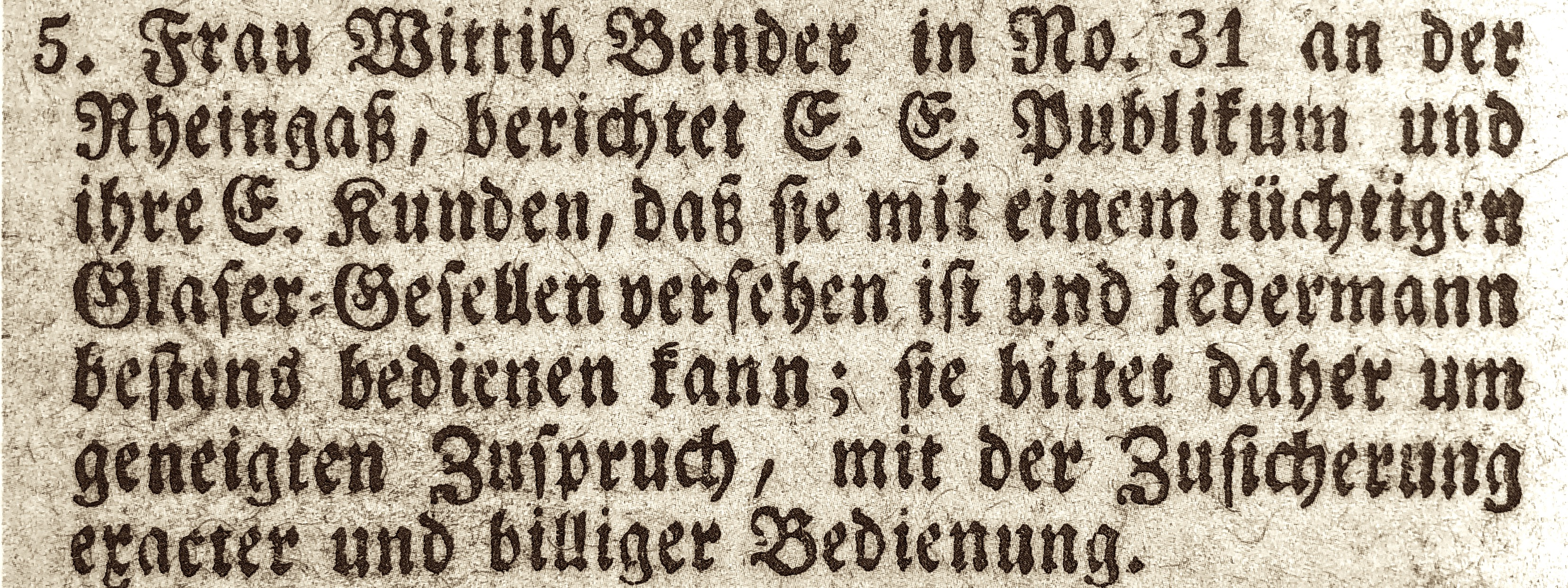 Theo der Pfeifenraucher: Anzeige Witwe Sara Bender, November 1816